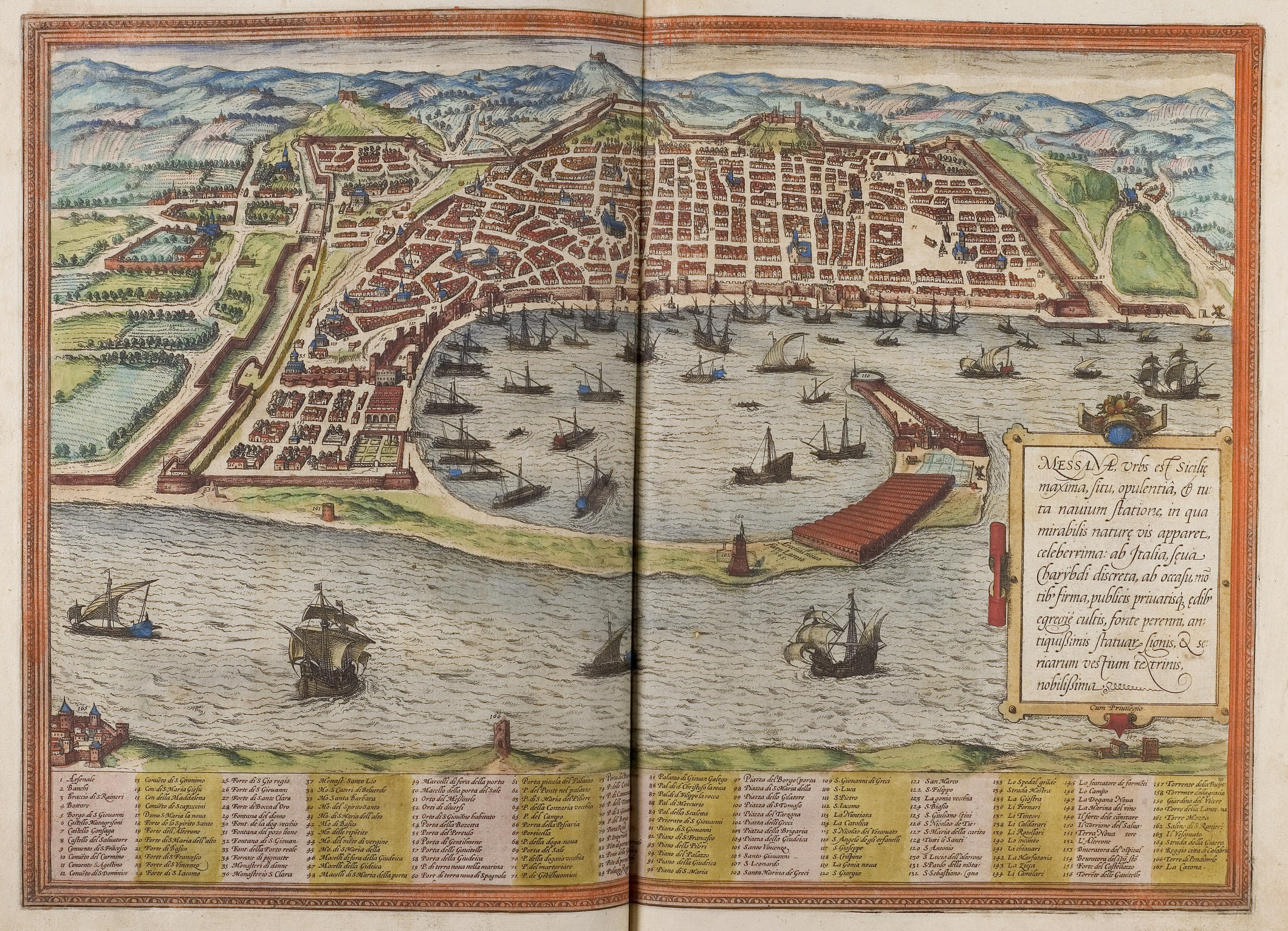 Messina